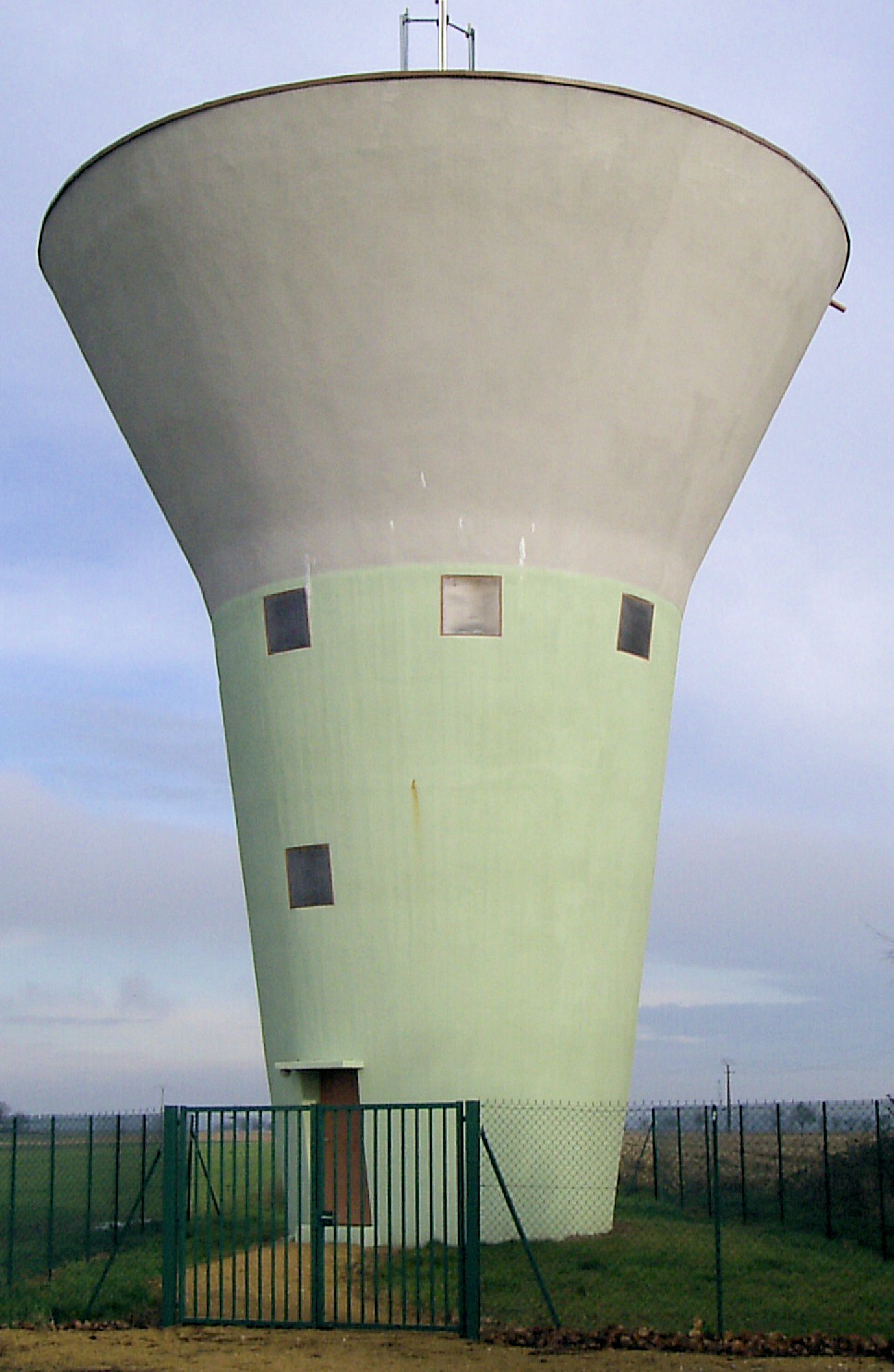 Le château d’eau de Lixing-lès-Saint-Avold